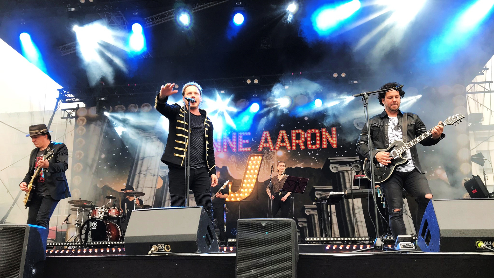 Jonne Aaron yhtyeineen esiintymässä Kotka Soi -tapahtumassa 14. kesäkuuta 2019.